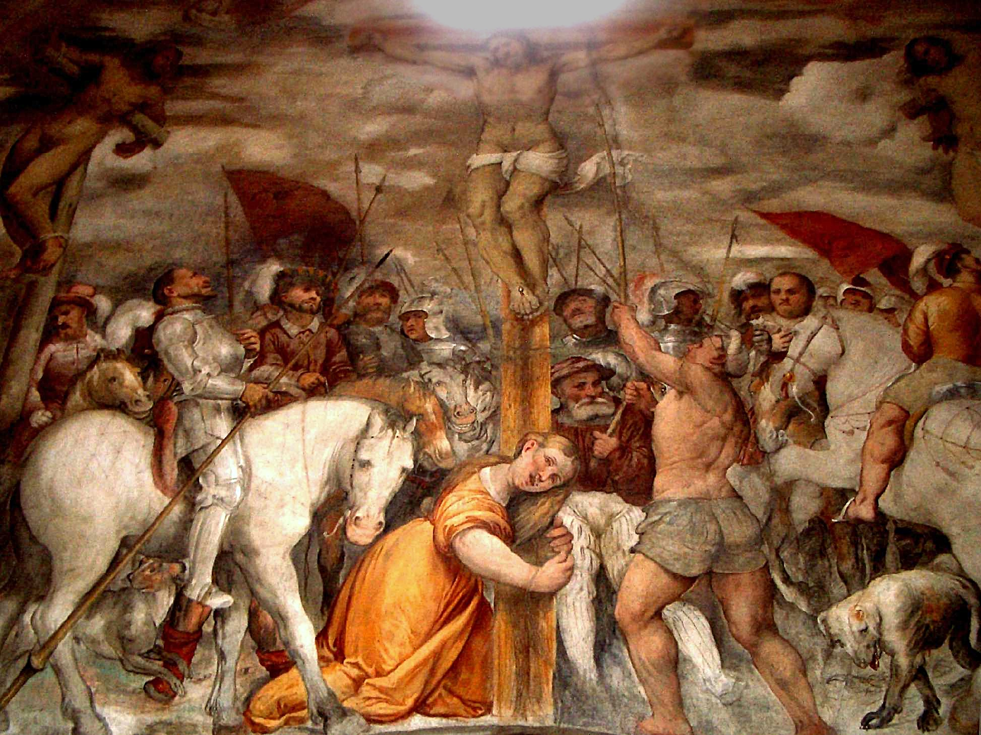 Gerolamo di Romano called Romanino, "Crucifixion" (detail), 1533-34, fresco, Church of Santa Maria della Neve, Pisogne (Brescia), Italy